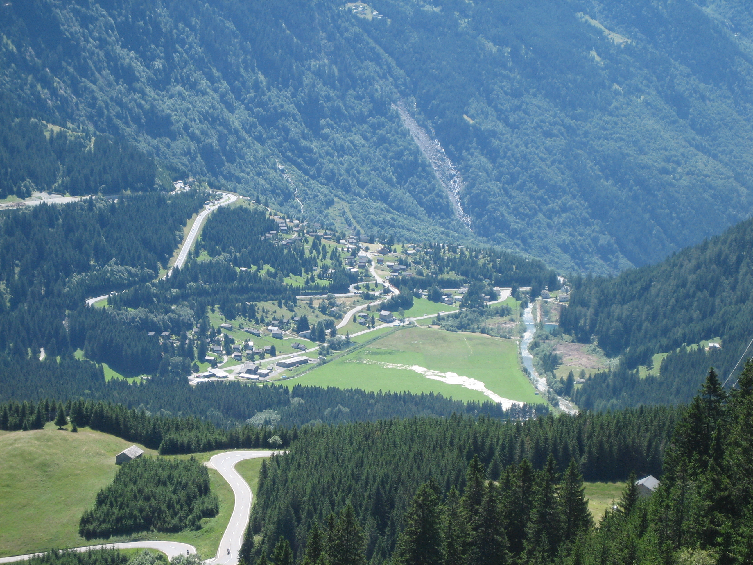 Die Ebene von Pian San Giacomo